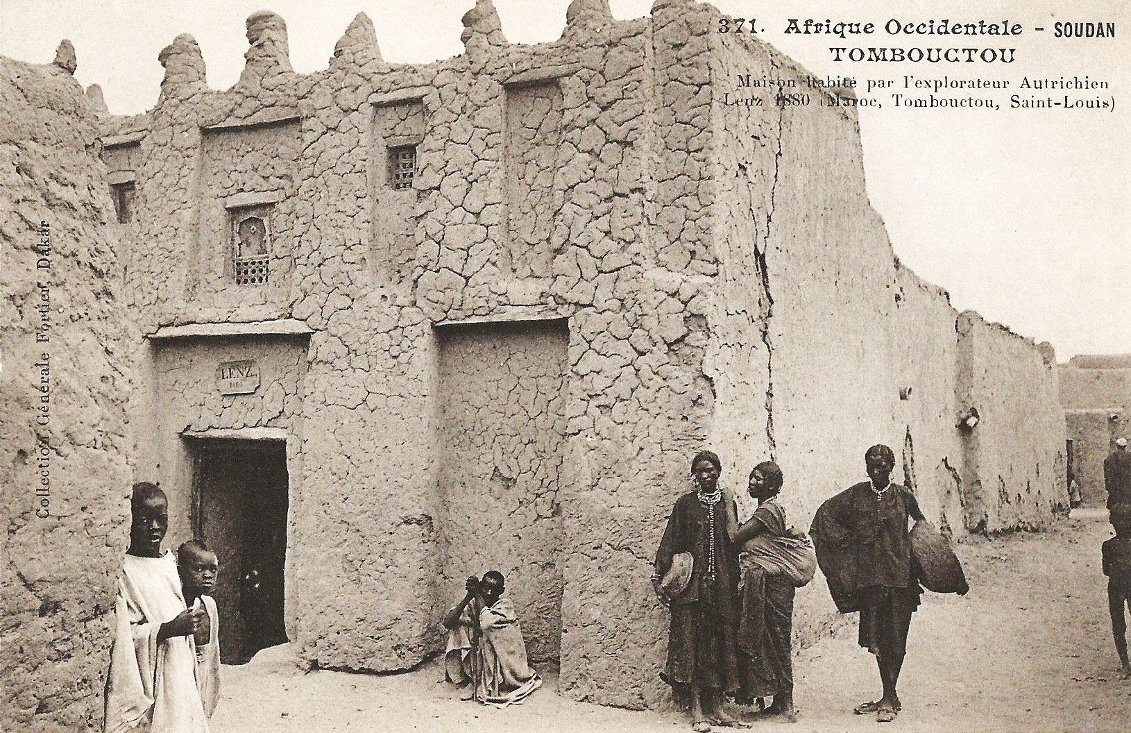 François-Edmond Fortier, Tombouctou. Maison habitée par l'explorateur autrichien Lenz 1880 (Maroc, Tombouctou, Saint-Louis). Afrique Occidentale - Soudan.